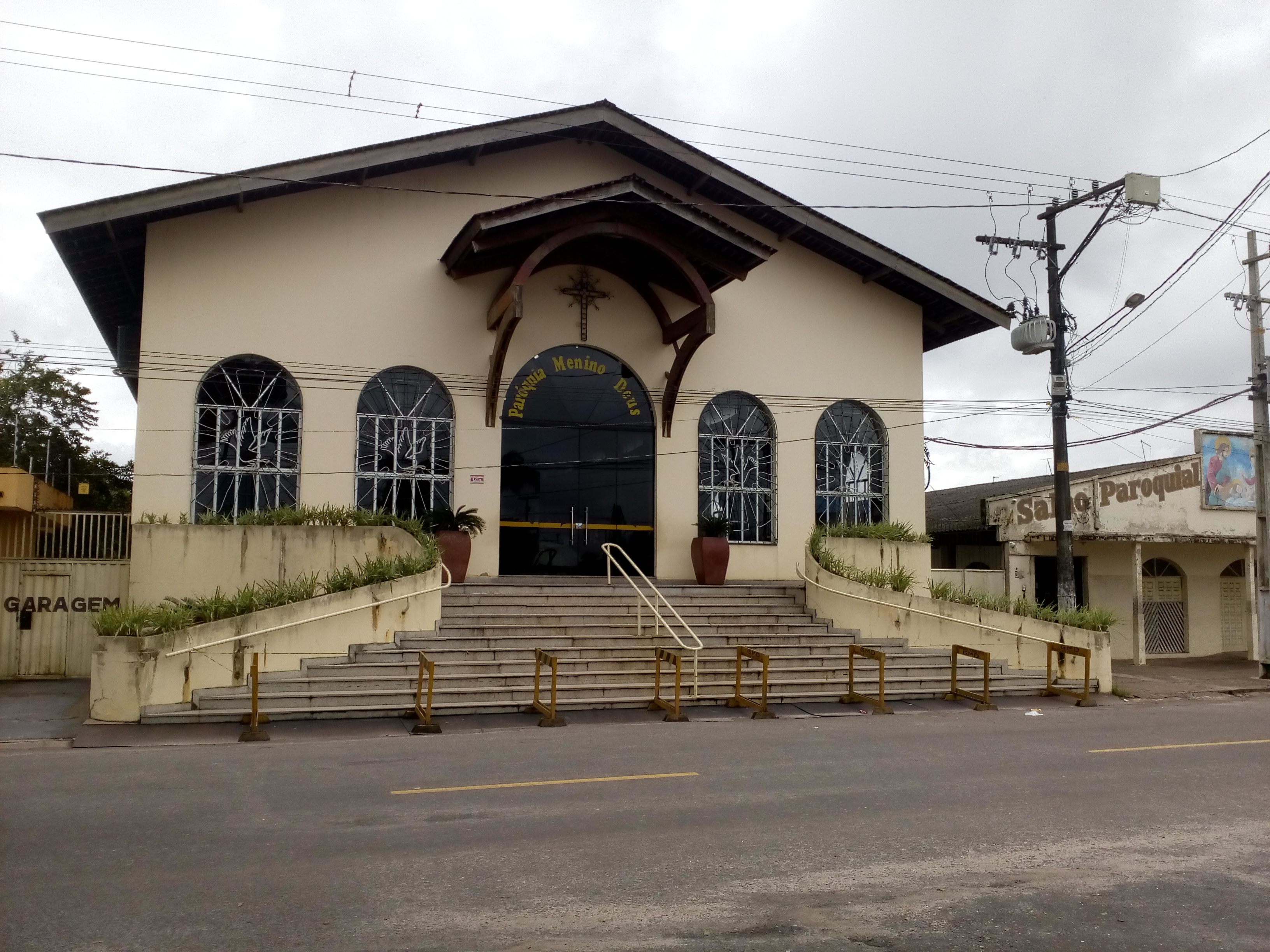 Paróquia Menino Deus em Marituba